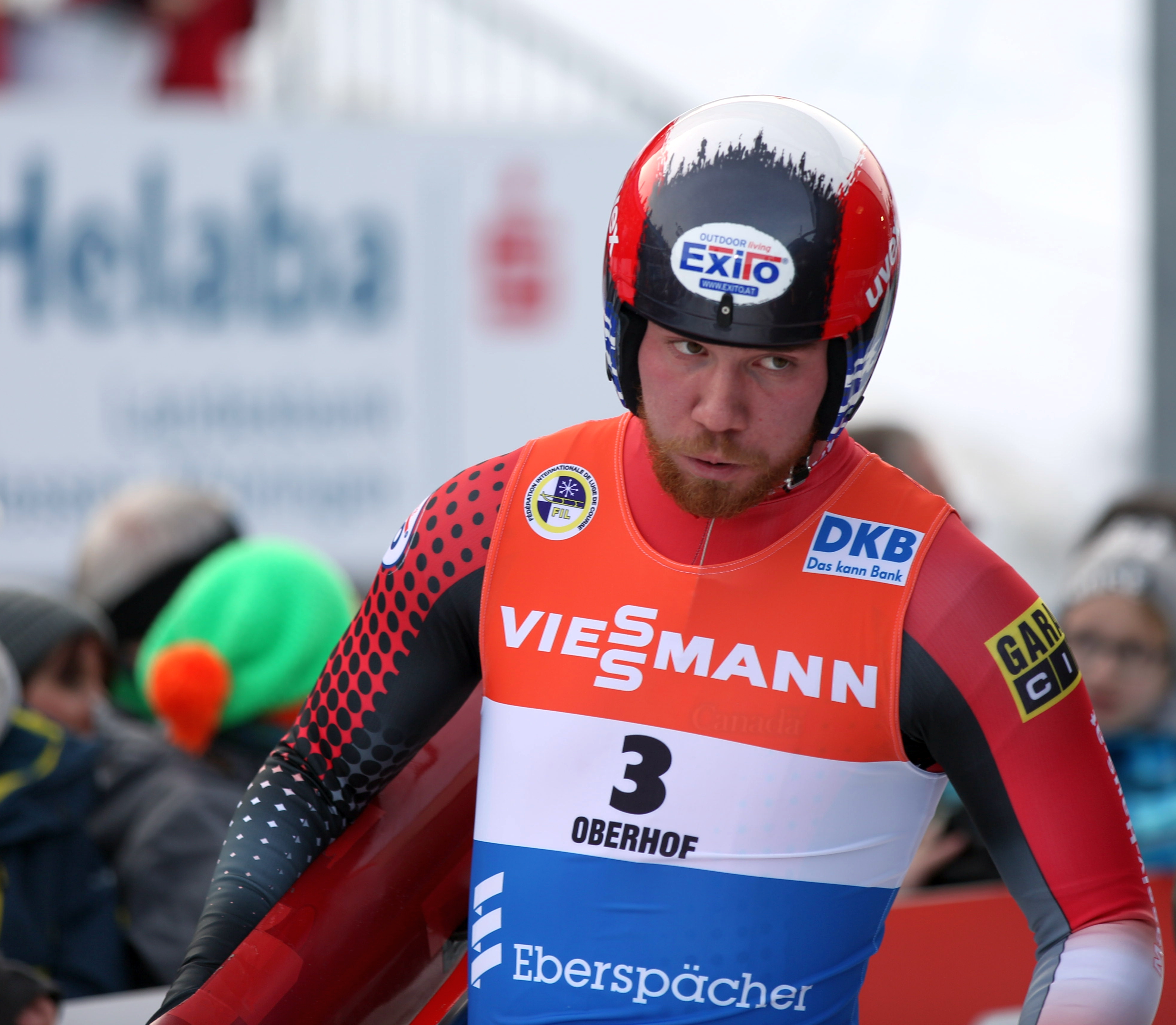 Mitchel Malyk beim Rennrodel-Weltcup der Herren in Oberhof 2017